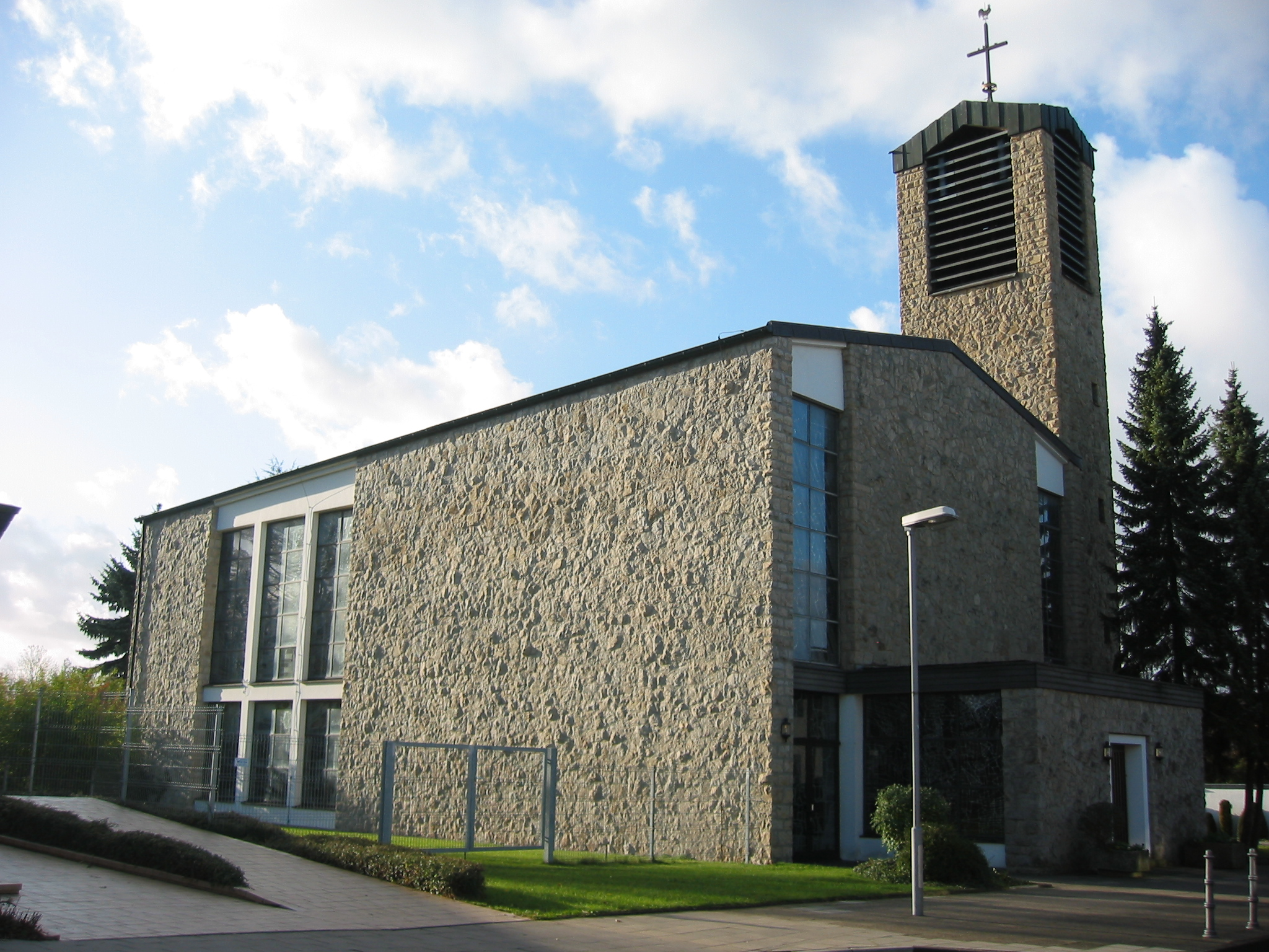 Katholische Kirche in Oberforstbach (bei Aachen)